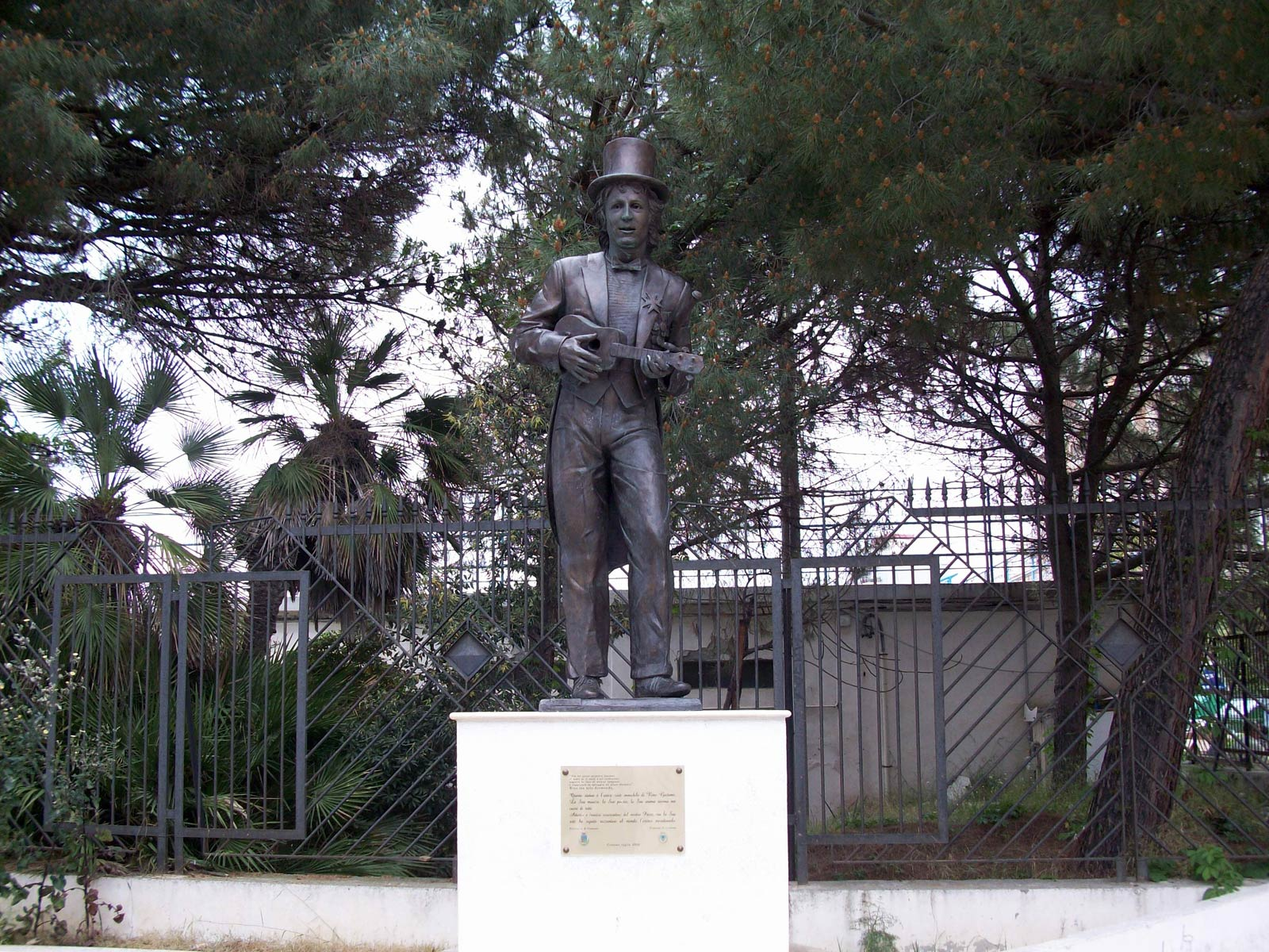 Statua di Rino Gaetano